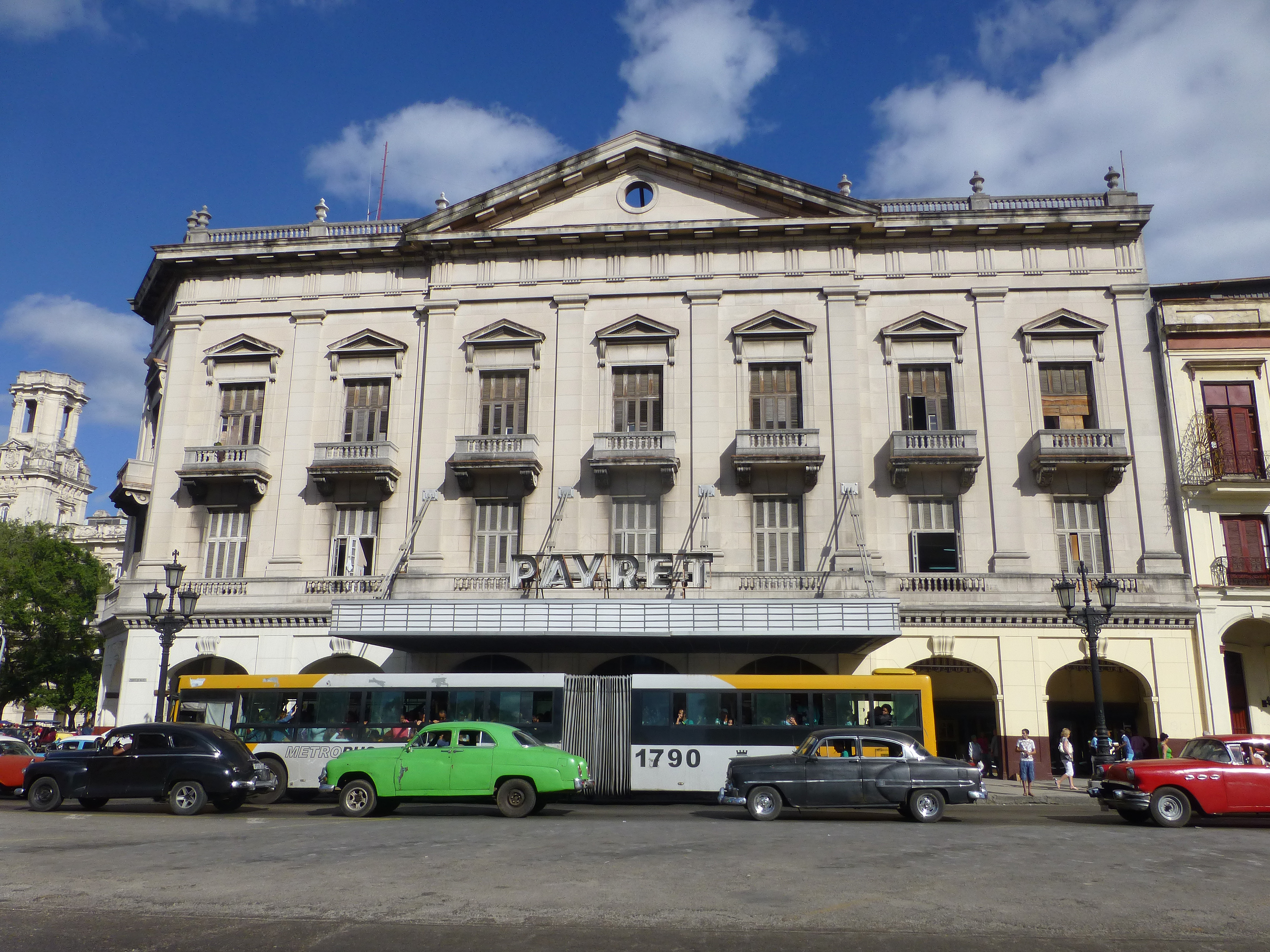 La Havane : ciné-théâtre Payret